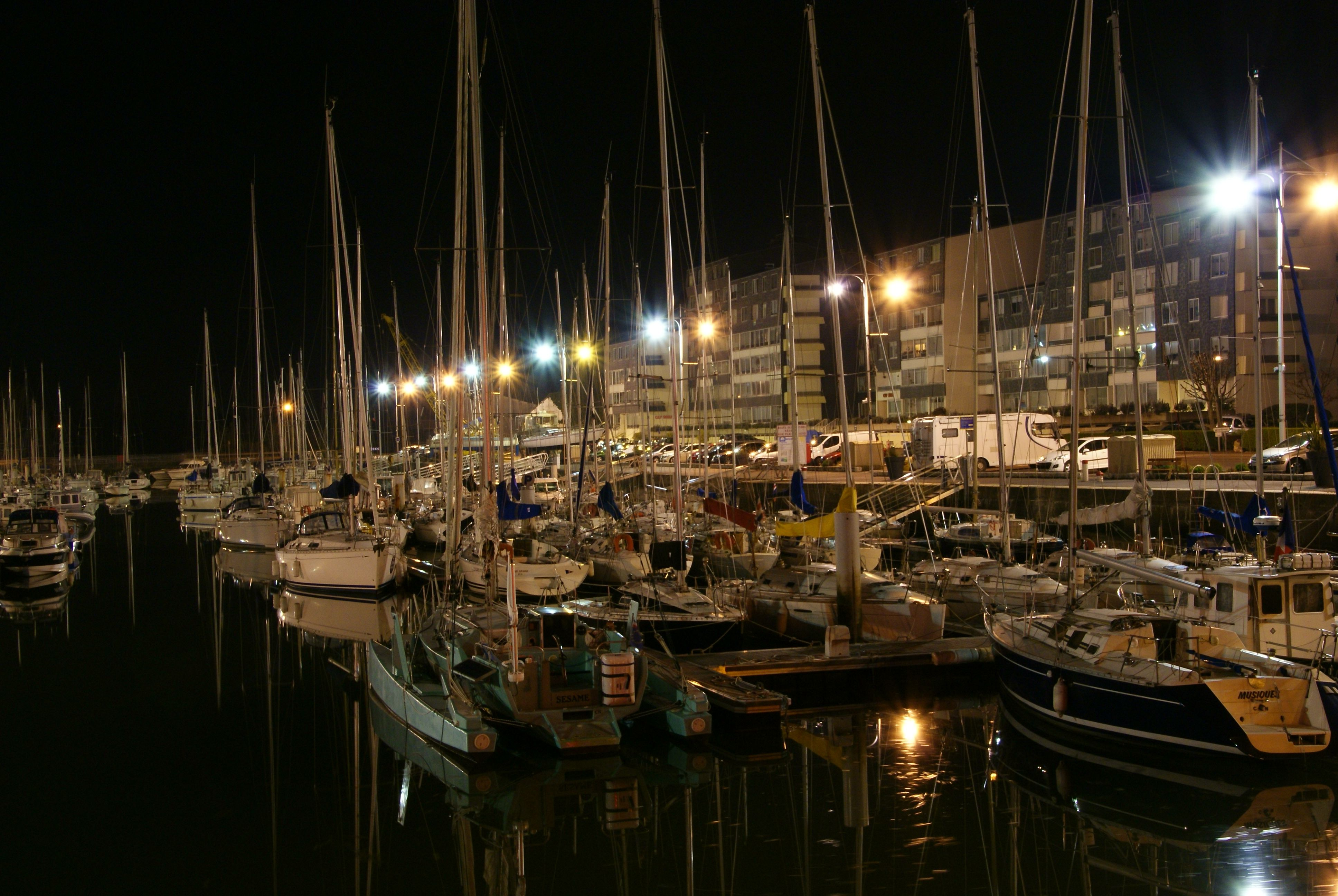 Courseulle: la marina